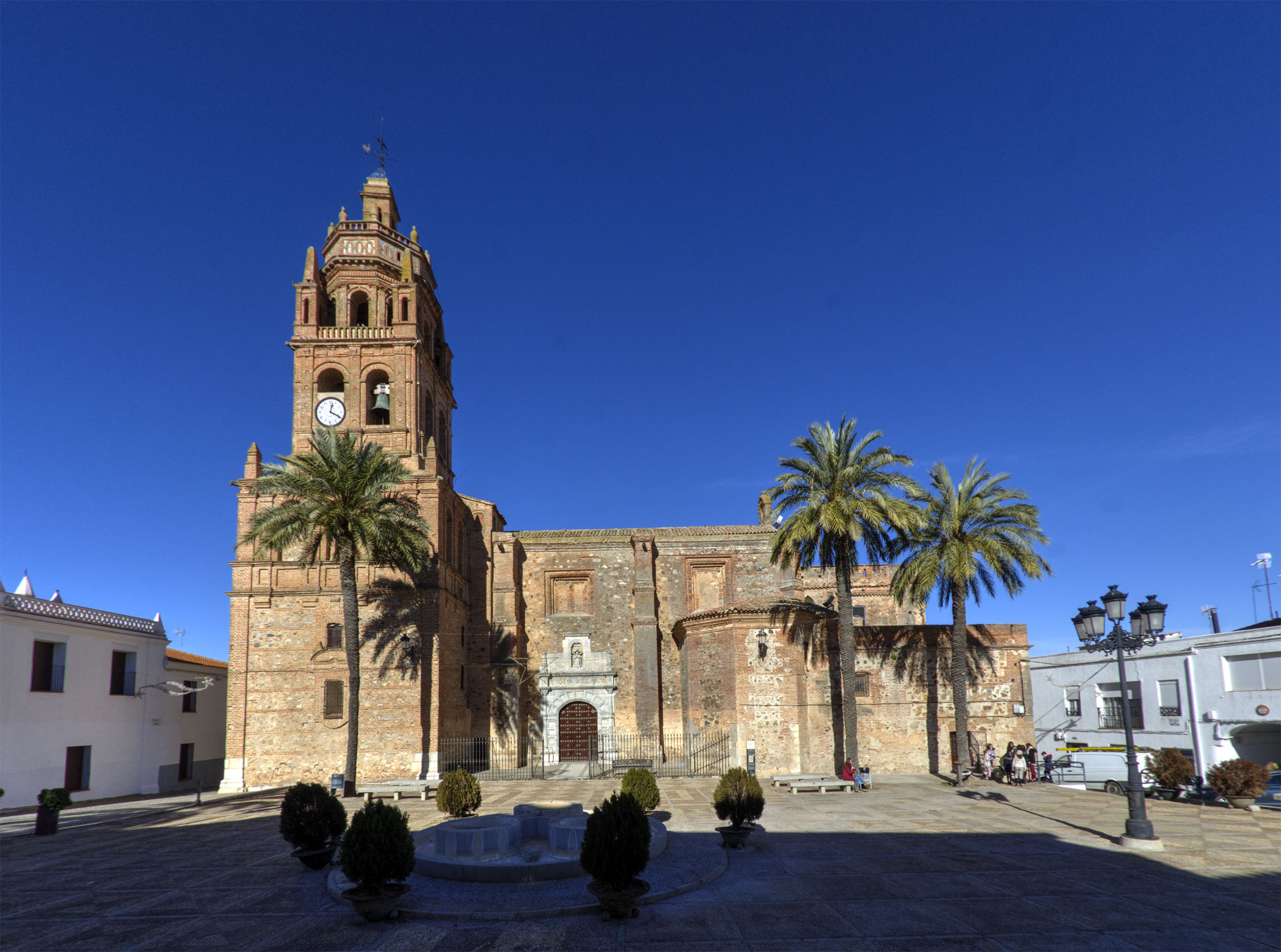 En la Plaza de España de Bienvenida (Badajoz) está la iglesia de Nuestra Señora de los Ángeles y el Ayuntamiento.